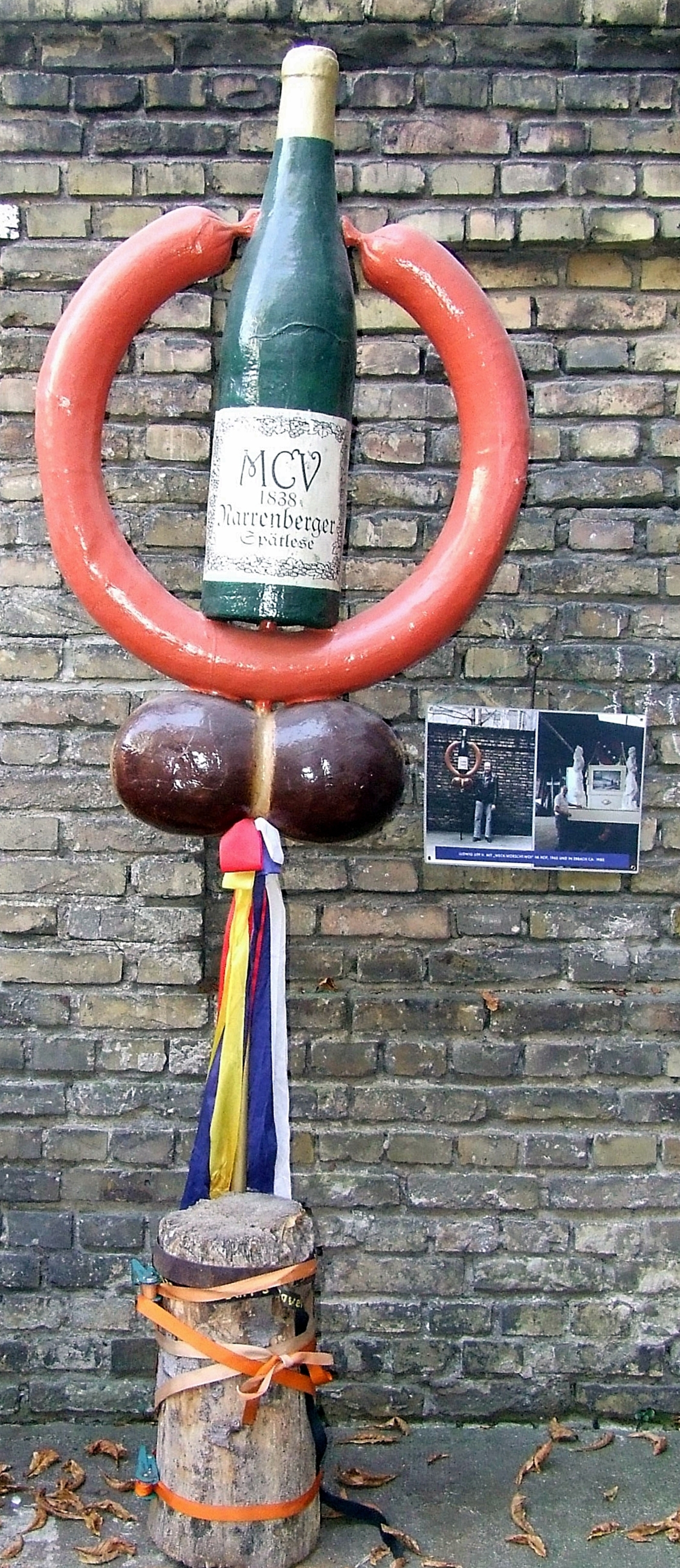 Weck, Worscht un Woi, MCV 1838, Narrenberger Spätlese